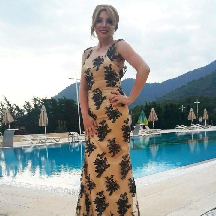 Letafet Elekberova celbedici gorunusde istirahetde